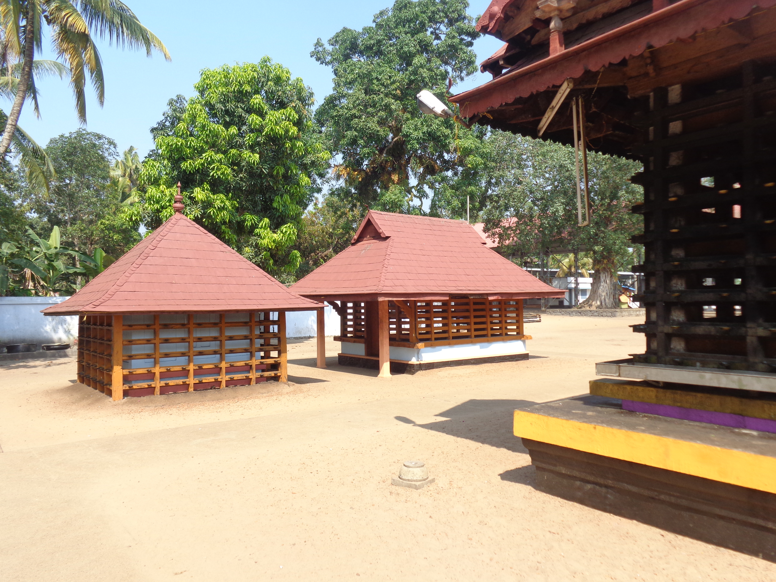 Thuravoor temple photos, cherthala thaluk, alappuzha Dist, Kerala. INDIA